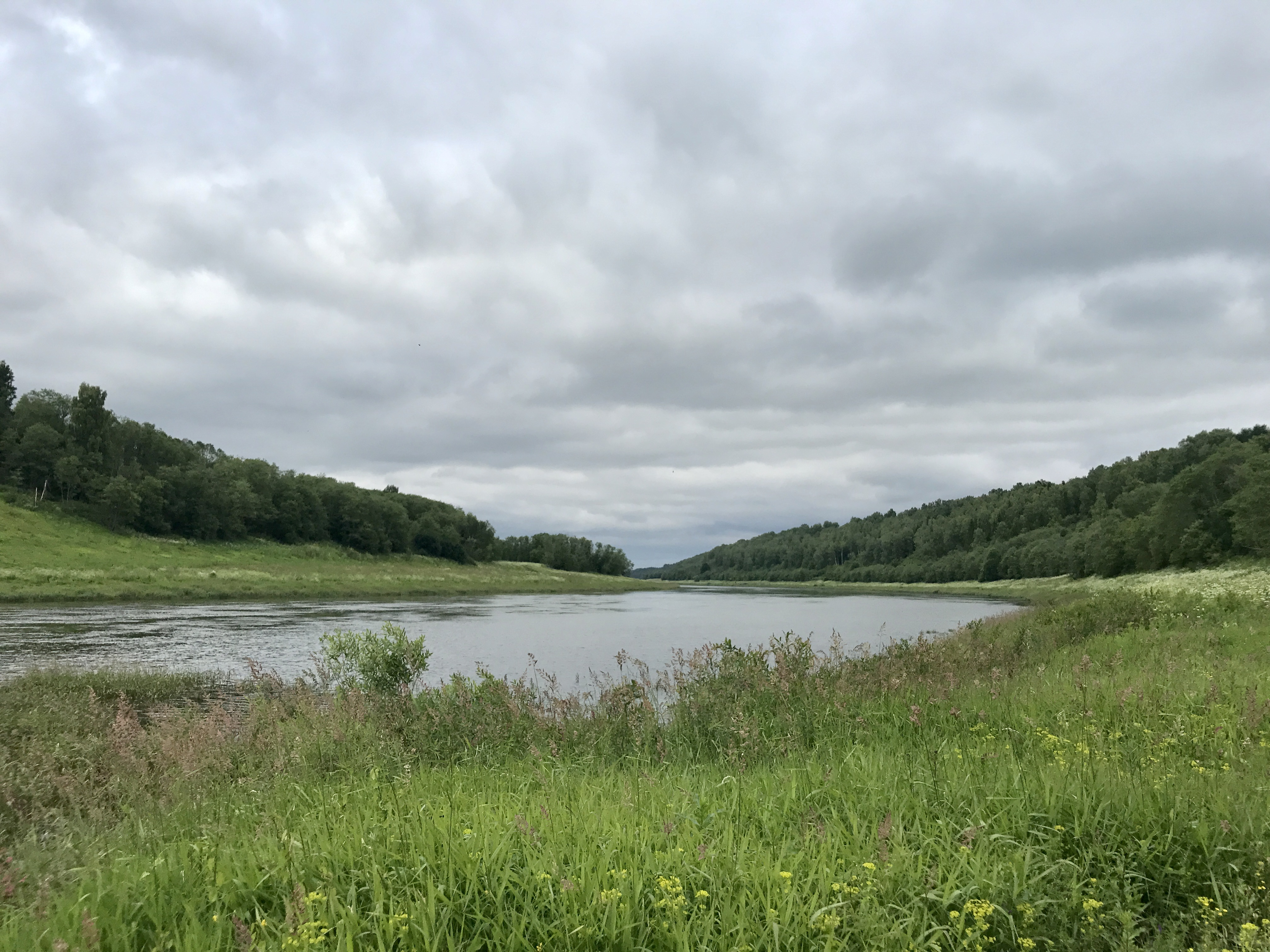 Овраг Щаповский: окрестности, Щапово, Старицкий район, Тверская область This image is related to the protected area of Russia number 6910901